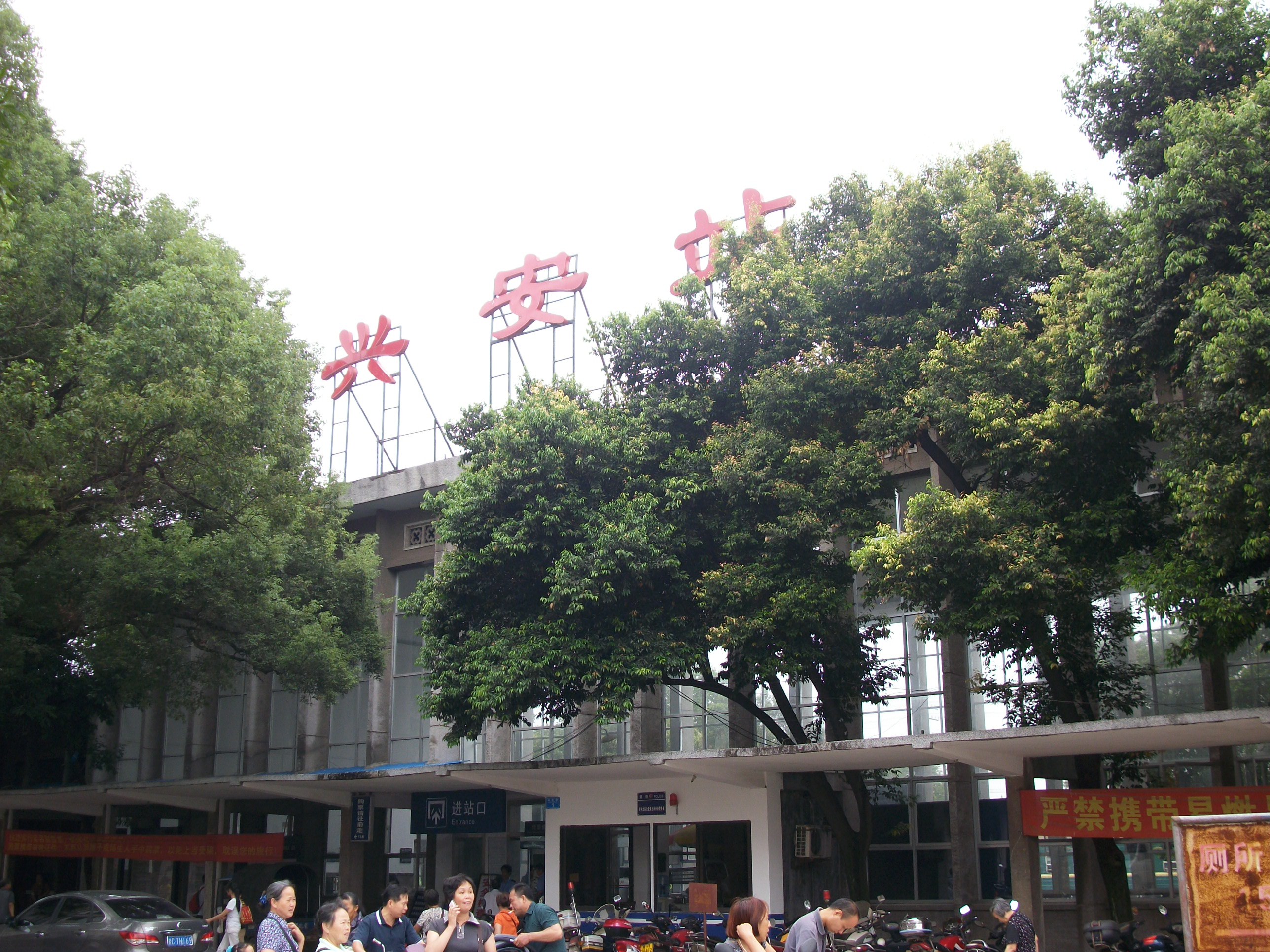 Xing'an Station